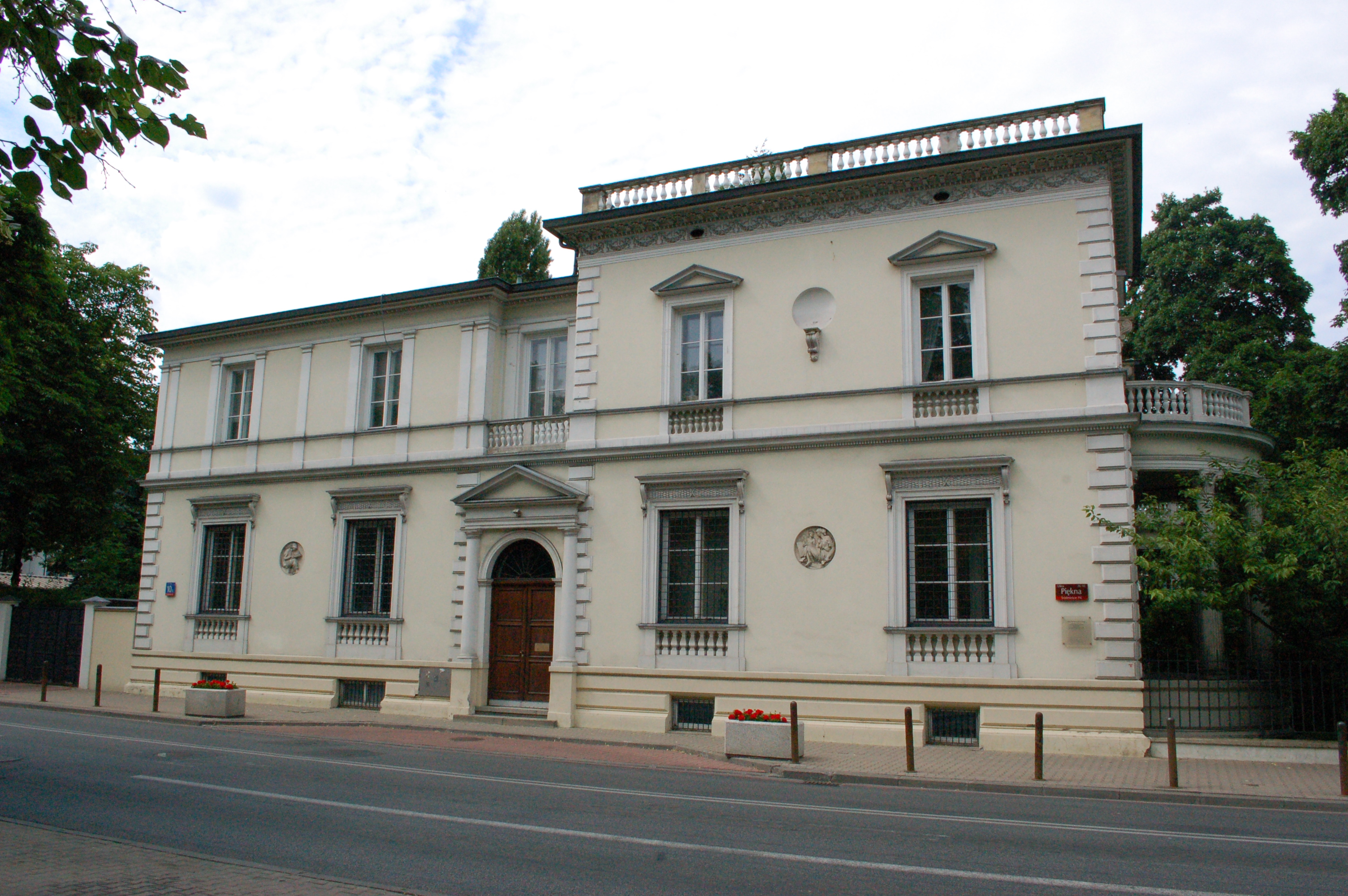 Warschau, Rau-Palast/Schweizer Botschaft